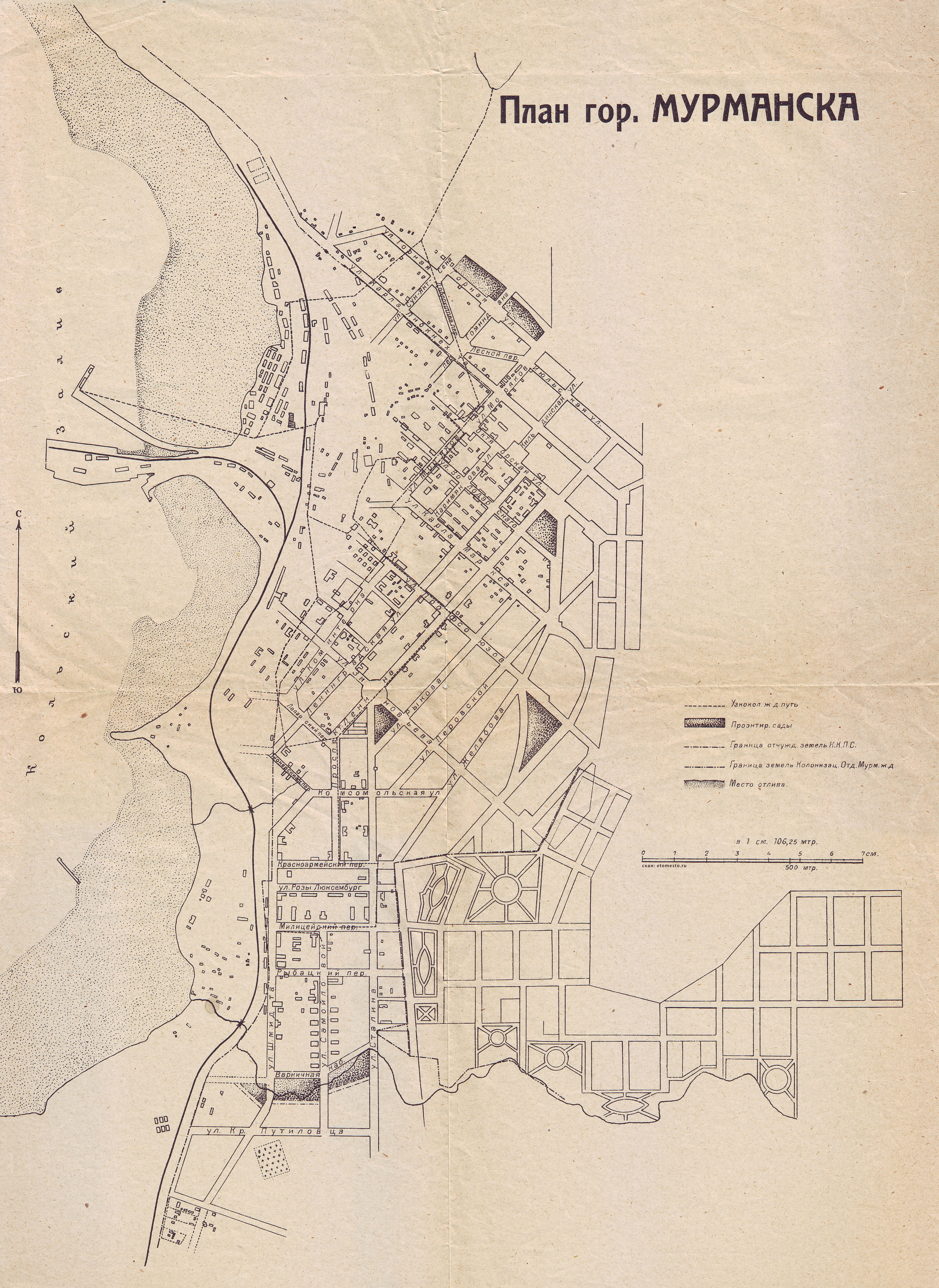 План города Мурманска 1928 года